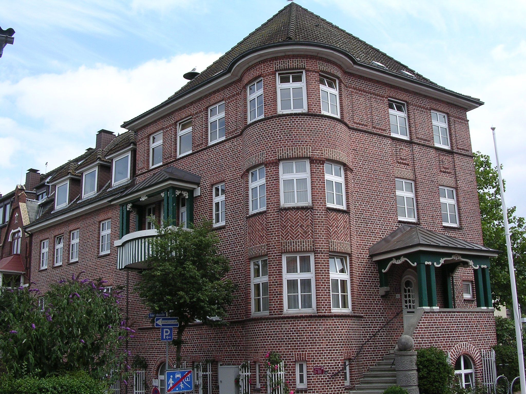 Rathaus der Gemeinde Laboe